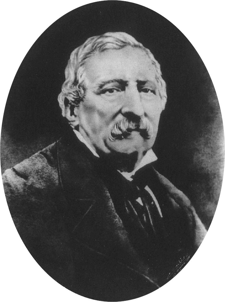 Lorenzo Pareto